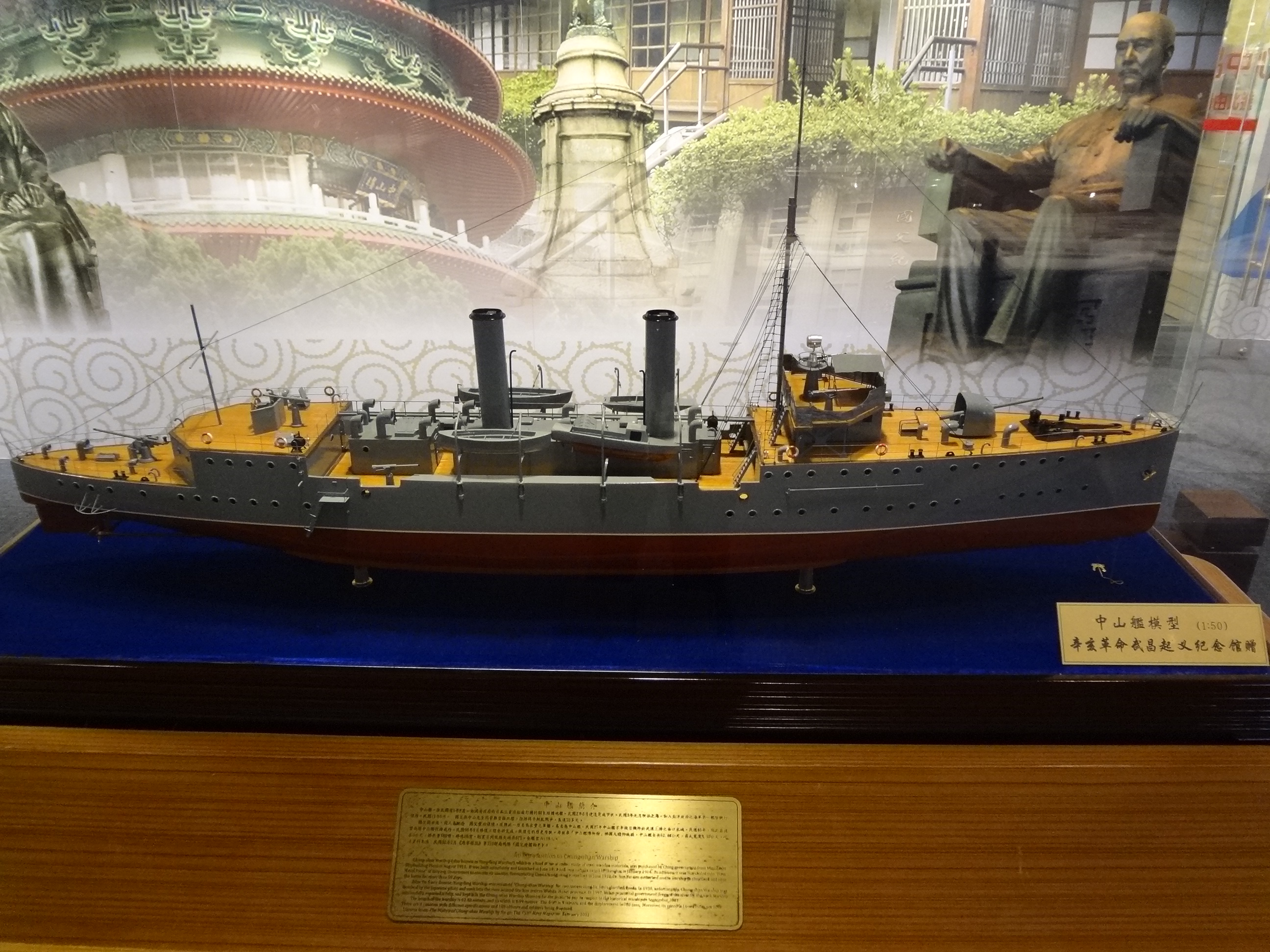 中華民國國立國父紀念館展示的中山艦1:50比例模型，辛亥革命武昌起義紀念館贈品。